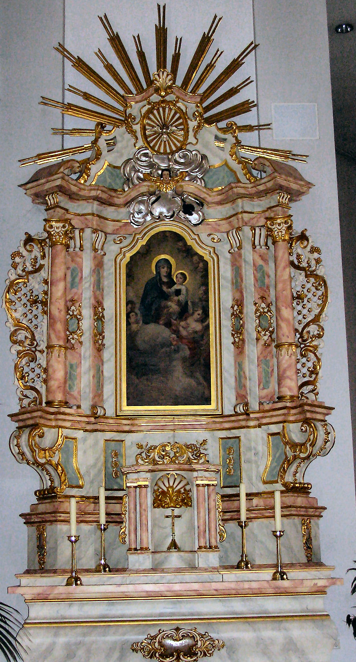 Pfarrkirche St. Vitus in Löningen